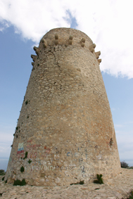 Torre de guaita del Cap d'Or (Teulada)